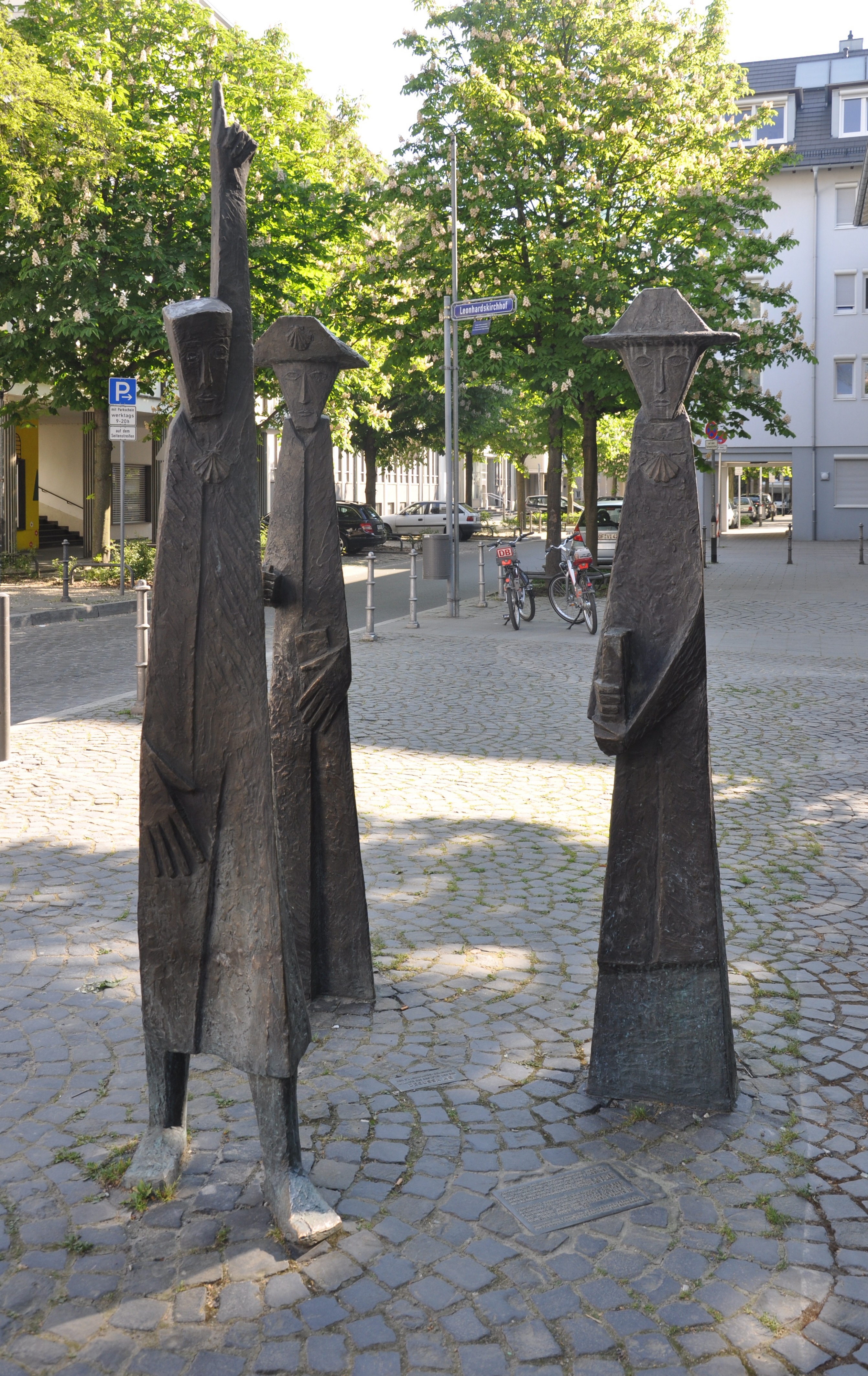 Frankfurt am Main, Skulpturengruppe „Drei Pilger“ (Jakobspilger) von Franziska Lenz-Gerharz, 1990, Bronze, aufgestellt vor der Leonhardskirche (Leonhardskirchhof)